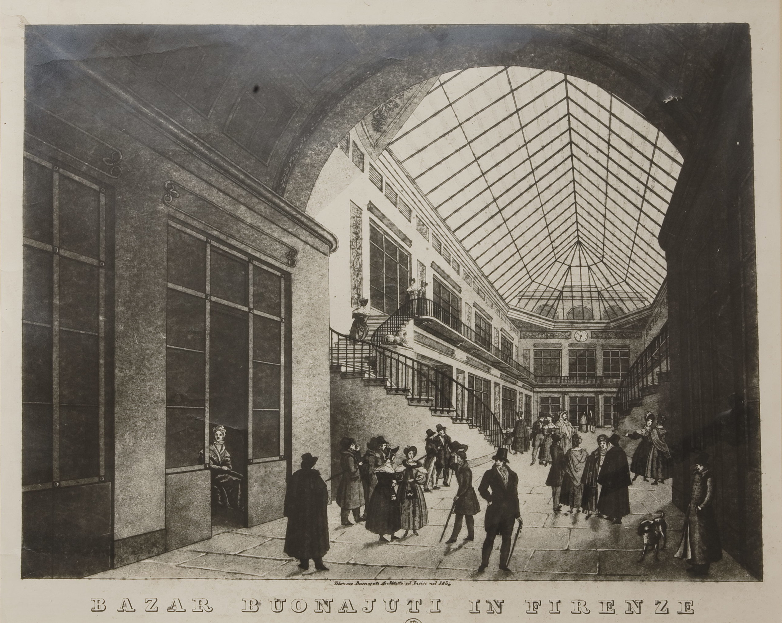 Stampa del 1834 rappresentante il salone d'ingresso del Bazar Bonaiuti di Firenze, progettato dall'architetto Telemaco Bonajuti. L'edificio commerciale nel '900 cambio' proprietà e denominazione dando vita ai "Magazzini Duilio 48" (AS Firenze, Archivio Duilio 48)